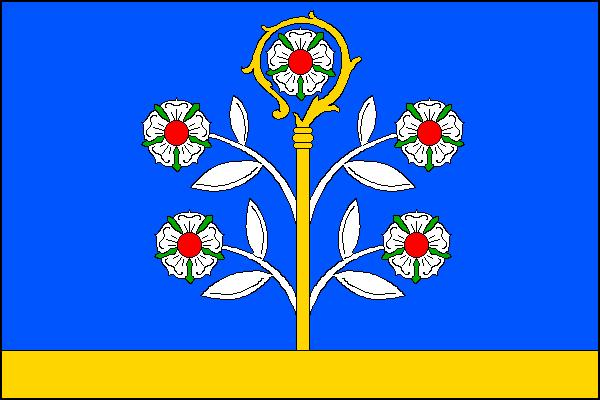 Vlajka obce Panenská Rozsíčka